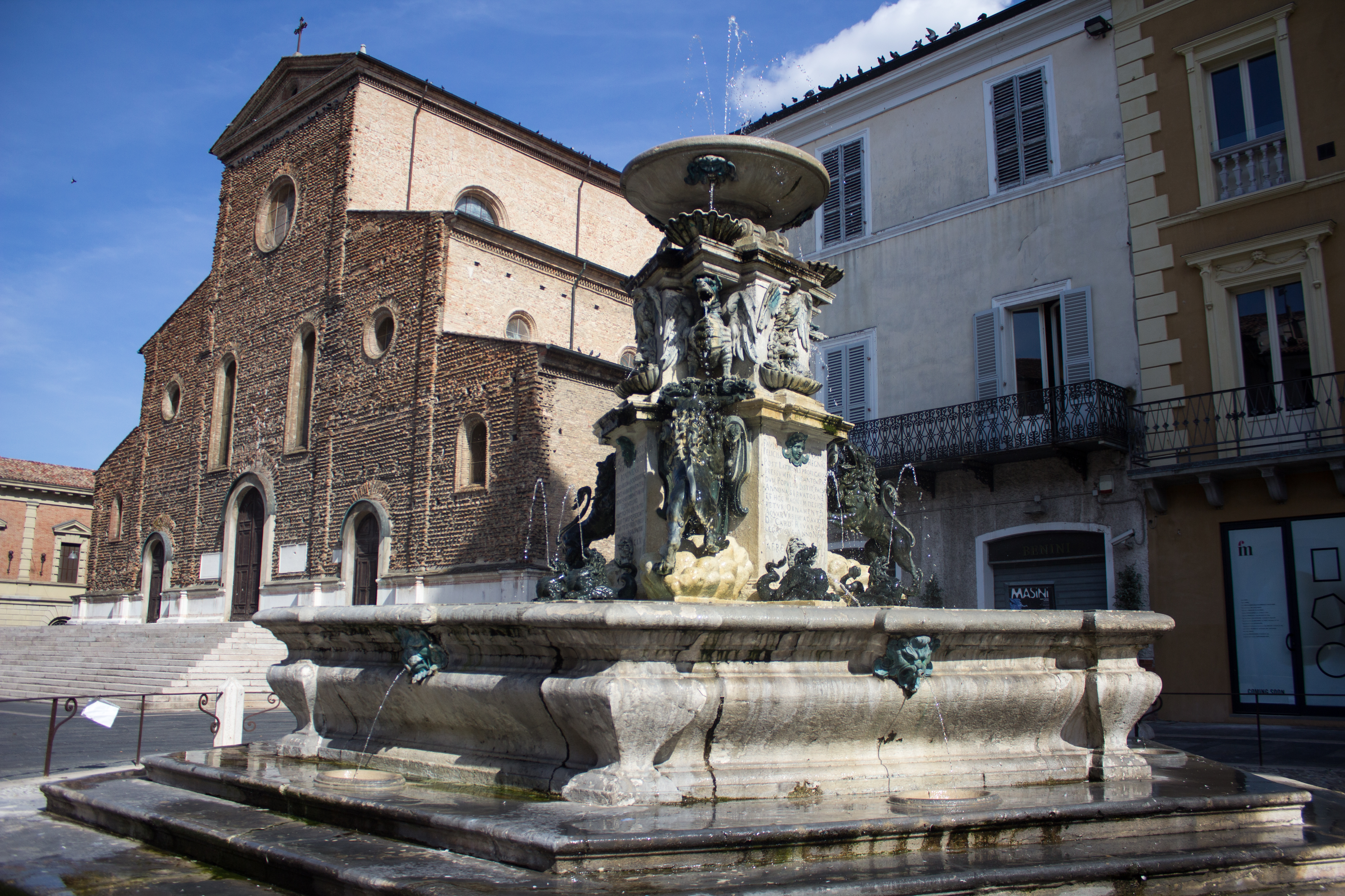 Fontana Monumentale e sullo sfondo il duomo di Faenza. This is a photo of a monument which is part of cultural heritage of Italy.